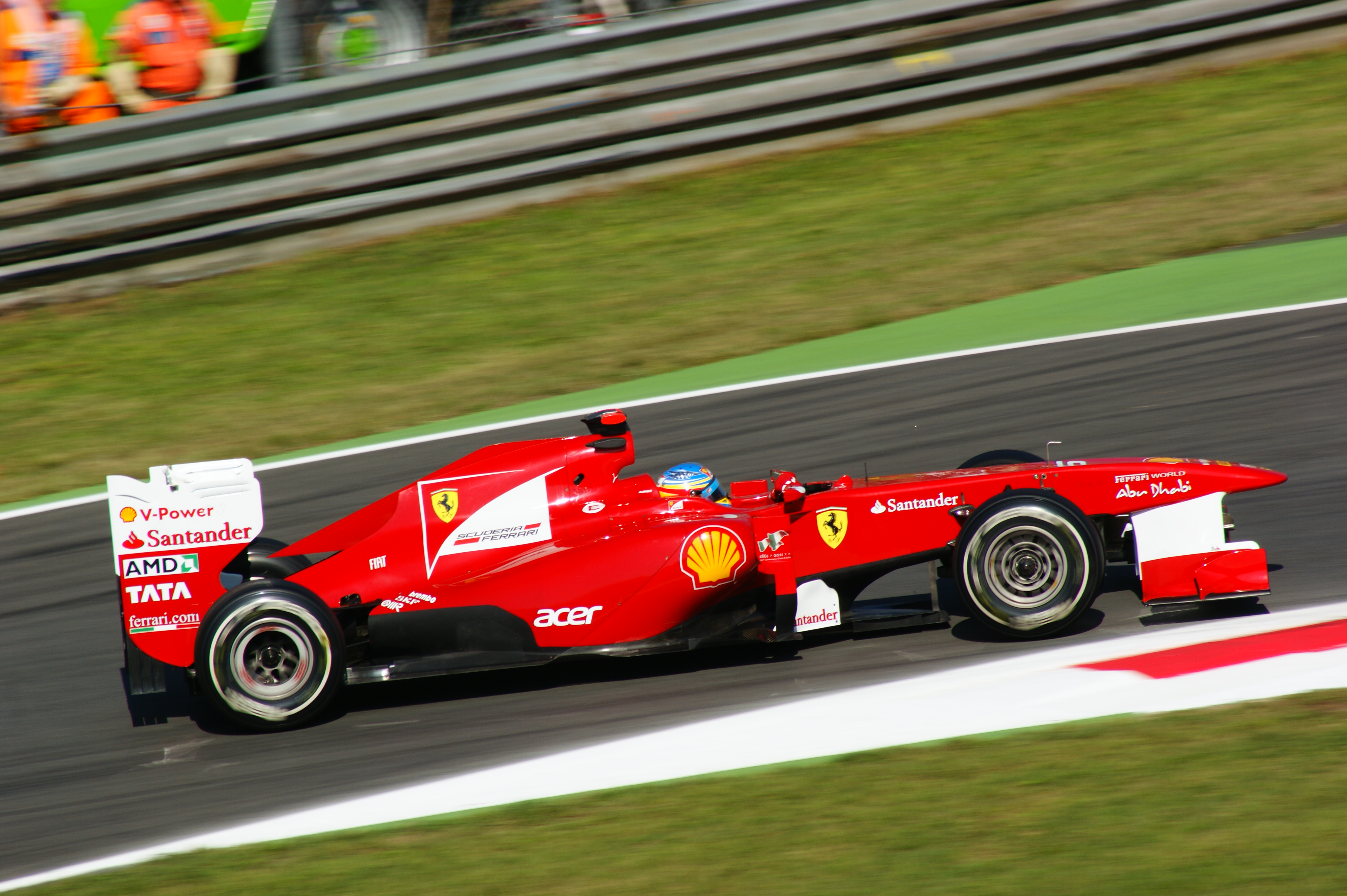 Fernando Alonso alla prima variante Monza 2011